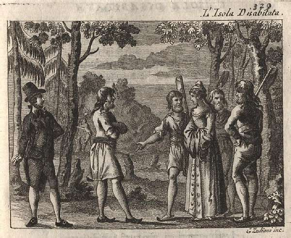 Grabado representando una escena de "La Isla desabitada" de Carlo Goldoni, con musica de Giuseppe Scarlatti.